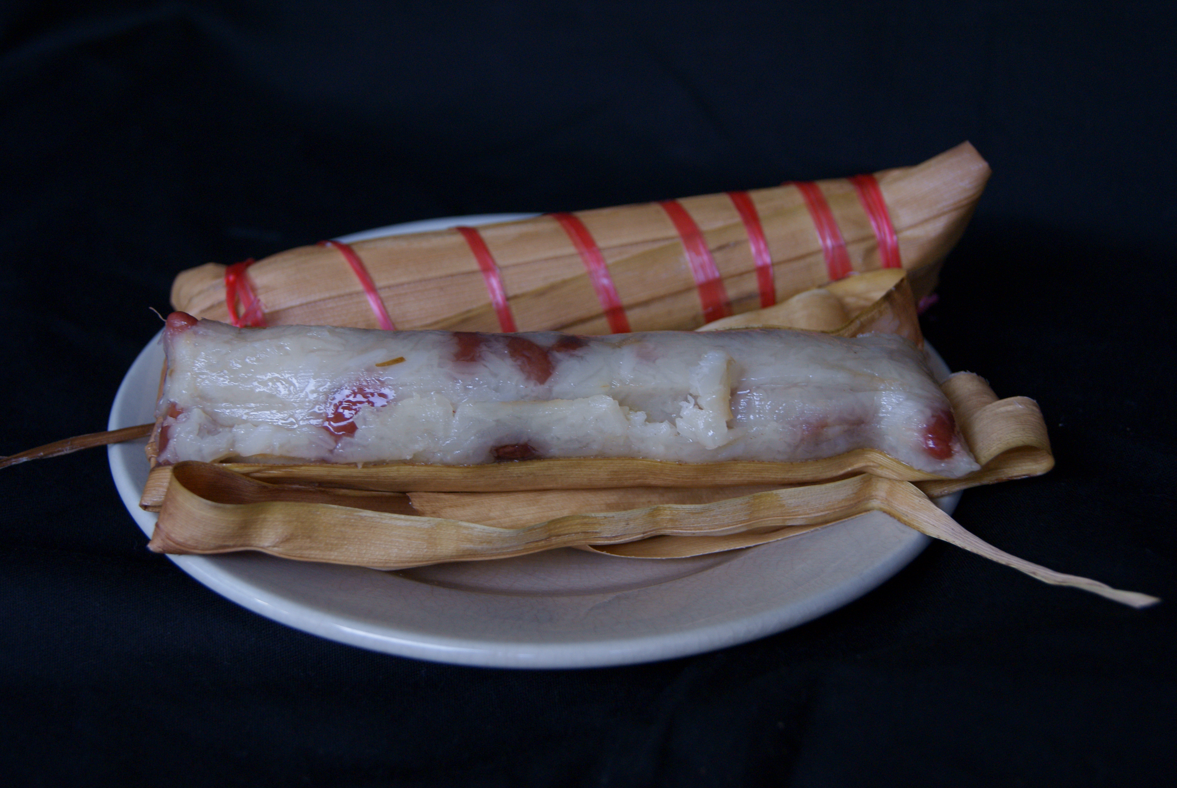 Lepet isi kacang merah